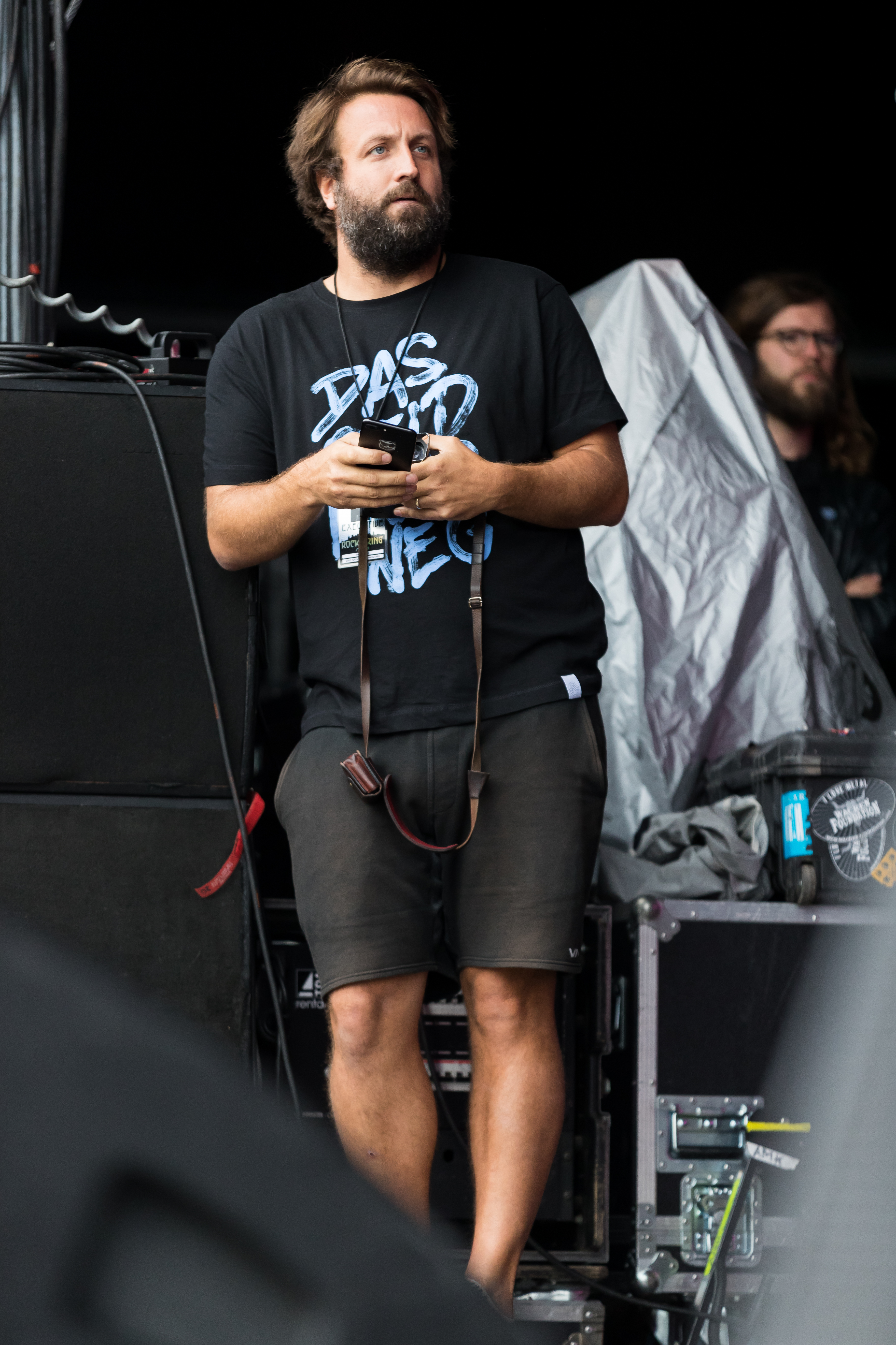 Paul Ripke during Rock am Ring at Nürburgring, Nürburg, Rheinland Pfalz, Germany on 2017-06-04, Photo: Sven Mandel